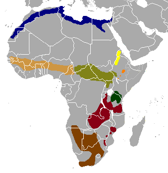 מפה